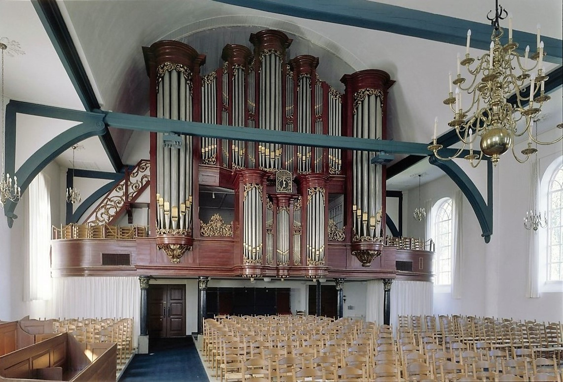 Nederlands Hervormde Kerk: Interieur, aanzicht orgel, orgelnummer 1543 (opmerking: Gefotografeerd voor Het Historische Orgel in Nederland 1819-1840, bladzijde 144)